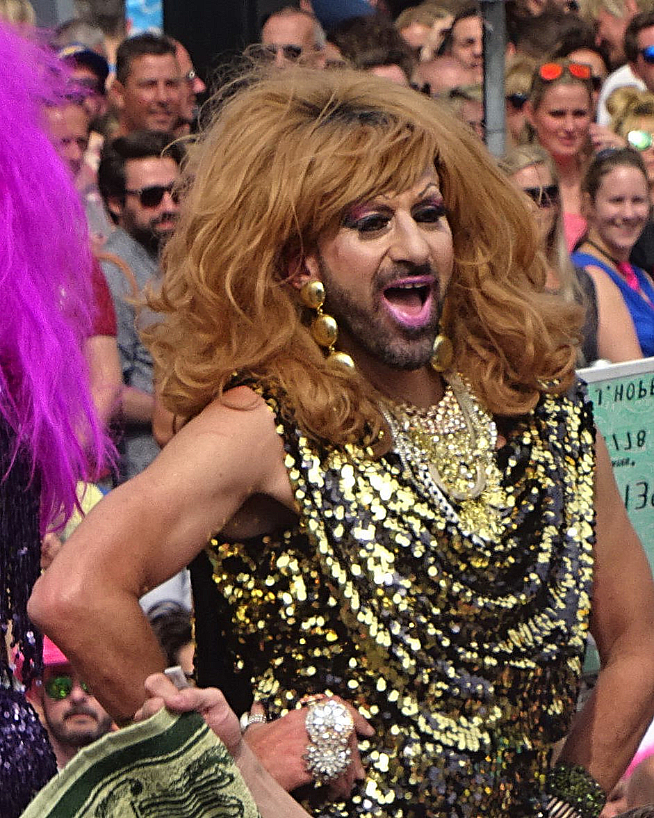 Jennifer Hopelezz tijdens Amsterdam Gay Pride 2015